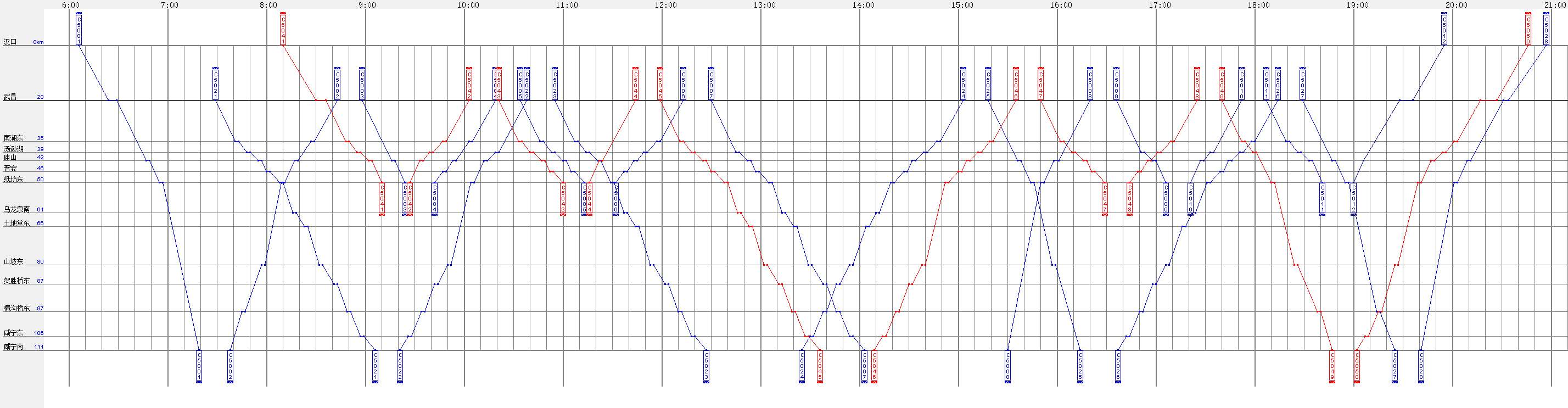 中文（中国大陆）: 武咸城际铁路自2017年12月28日起执行的新运行图（含高峰车次）